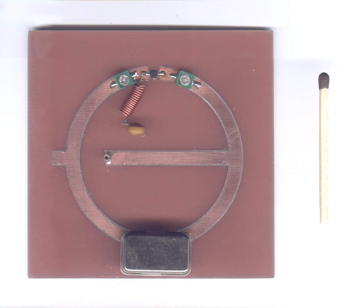 oscylator wykonany techniką linii mikropaskowych